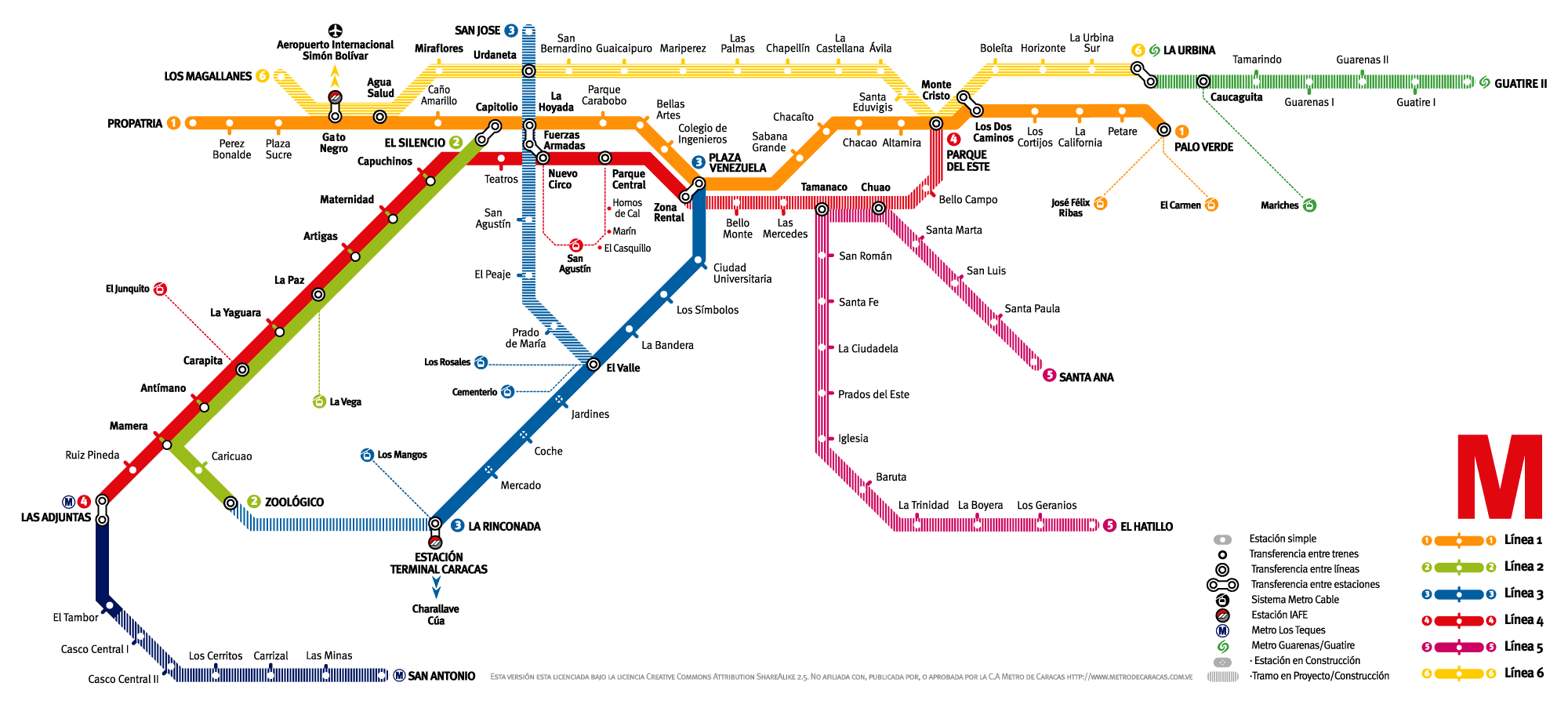 Mapa del Metro de Caracas con estaciones y líneas actuales y planificadas o en construcción